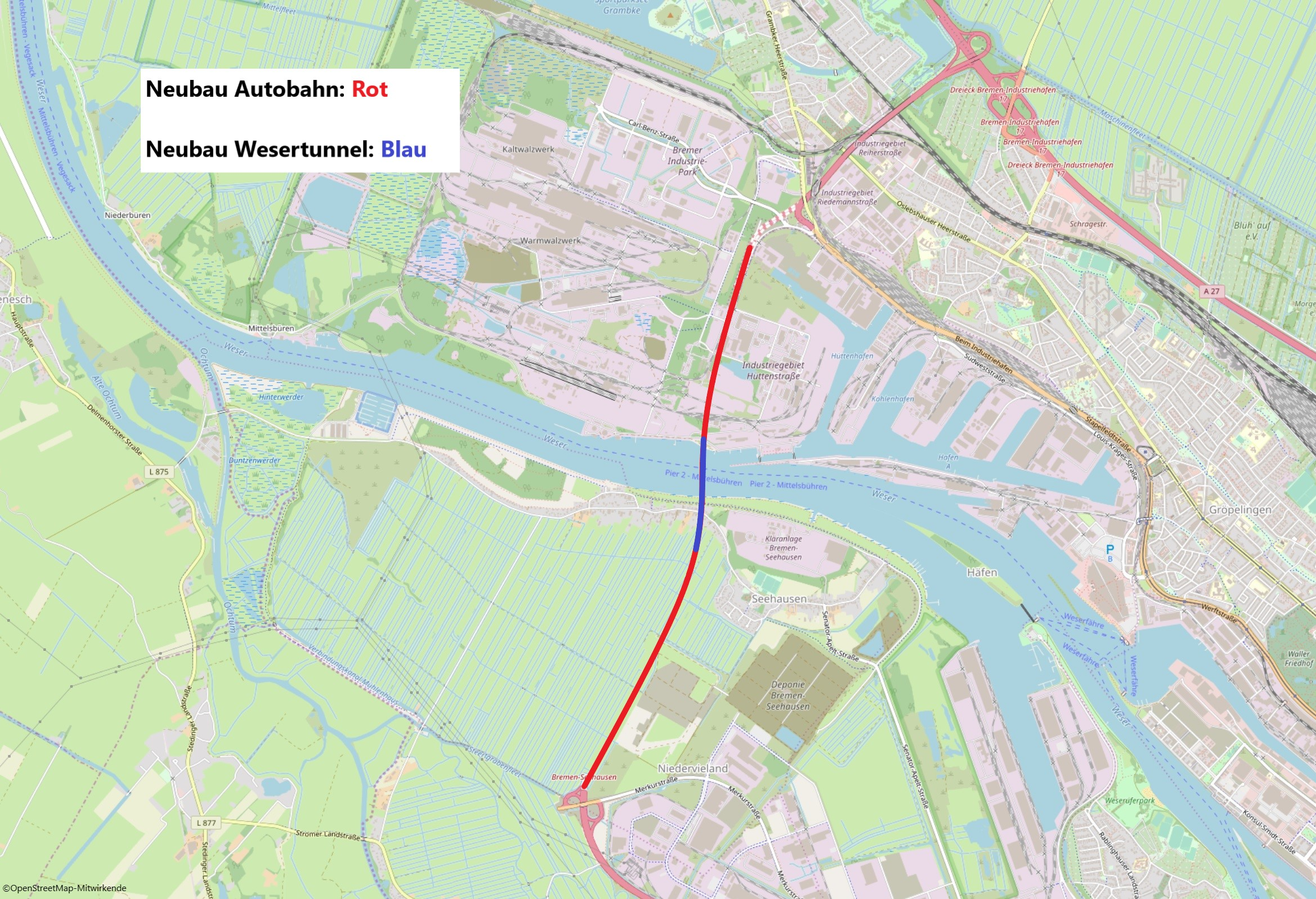 Streckenverlauf der Autobahn und des neuen Wesertunnels bei Bremen